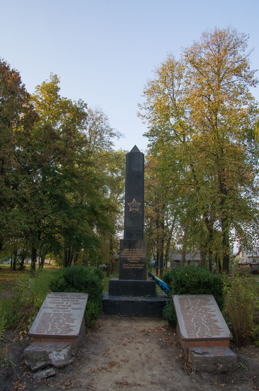 Пам'ятник воїнам-односельчанам, загиблим у роки ВВВ, Житомирський район, с. Березина , Глибочицька с/р, біля контори